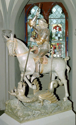 Der Heilige St. Georg, Drachentöter, Standbild in einer Kapelle auf der Burg Hohenzollern bei Hechingen im Zollernalbkreis